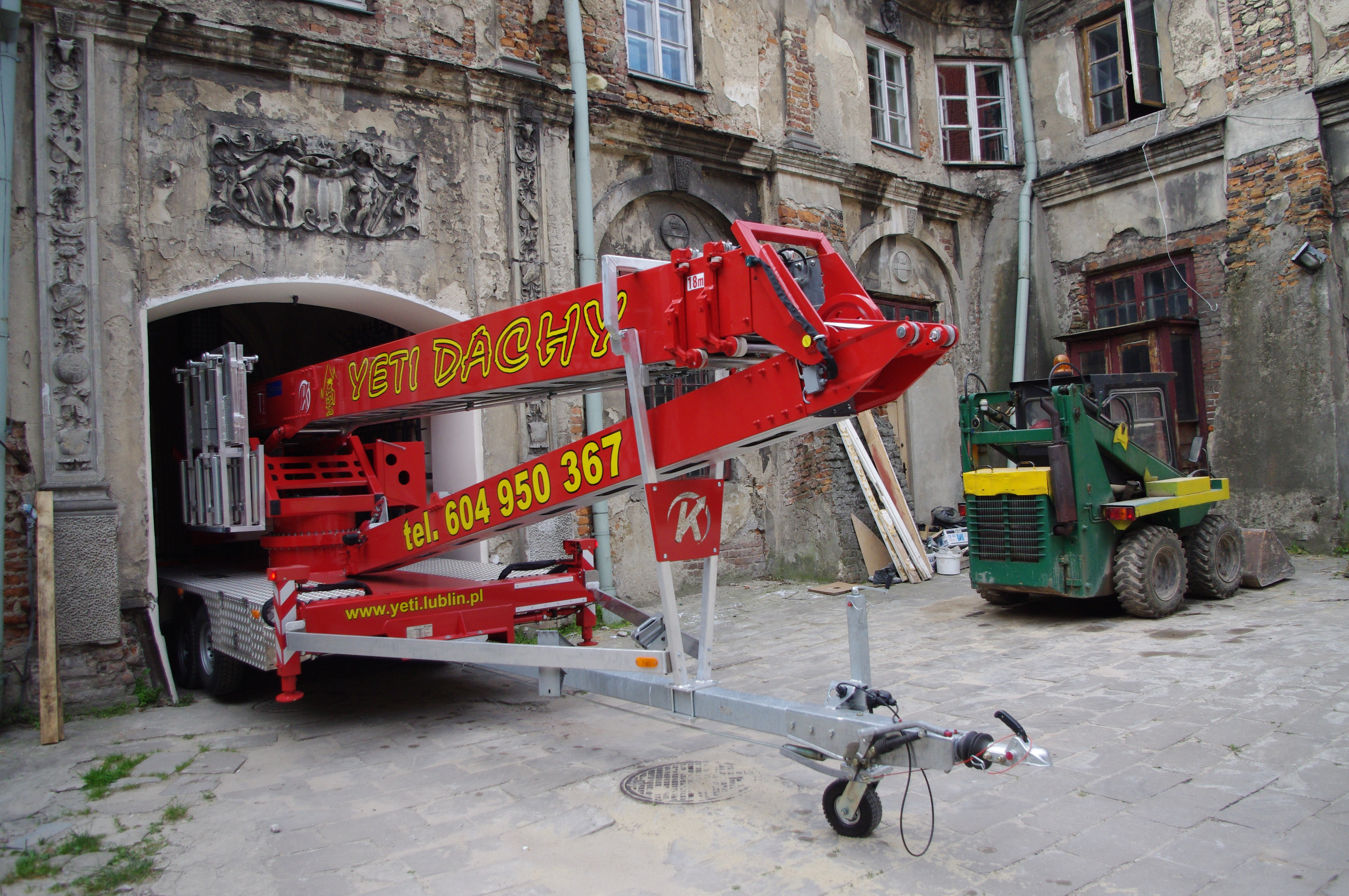 Mobilkran im Innenhof